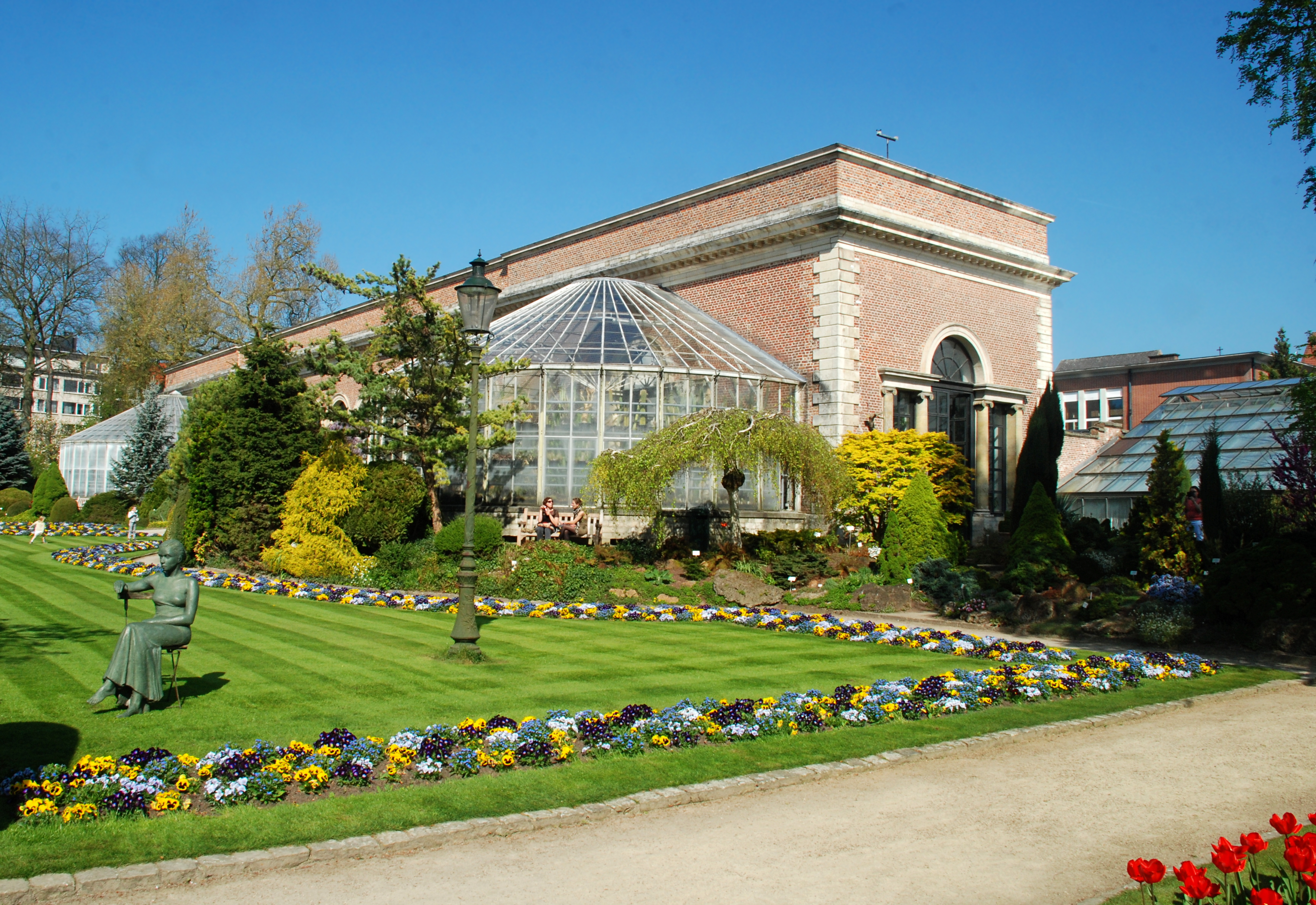 Belgique - Louvain - Jardin botanique (Kruidtuin) - orangerie néo-classique (architecte Charles Vander Straeten)